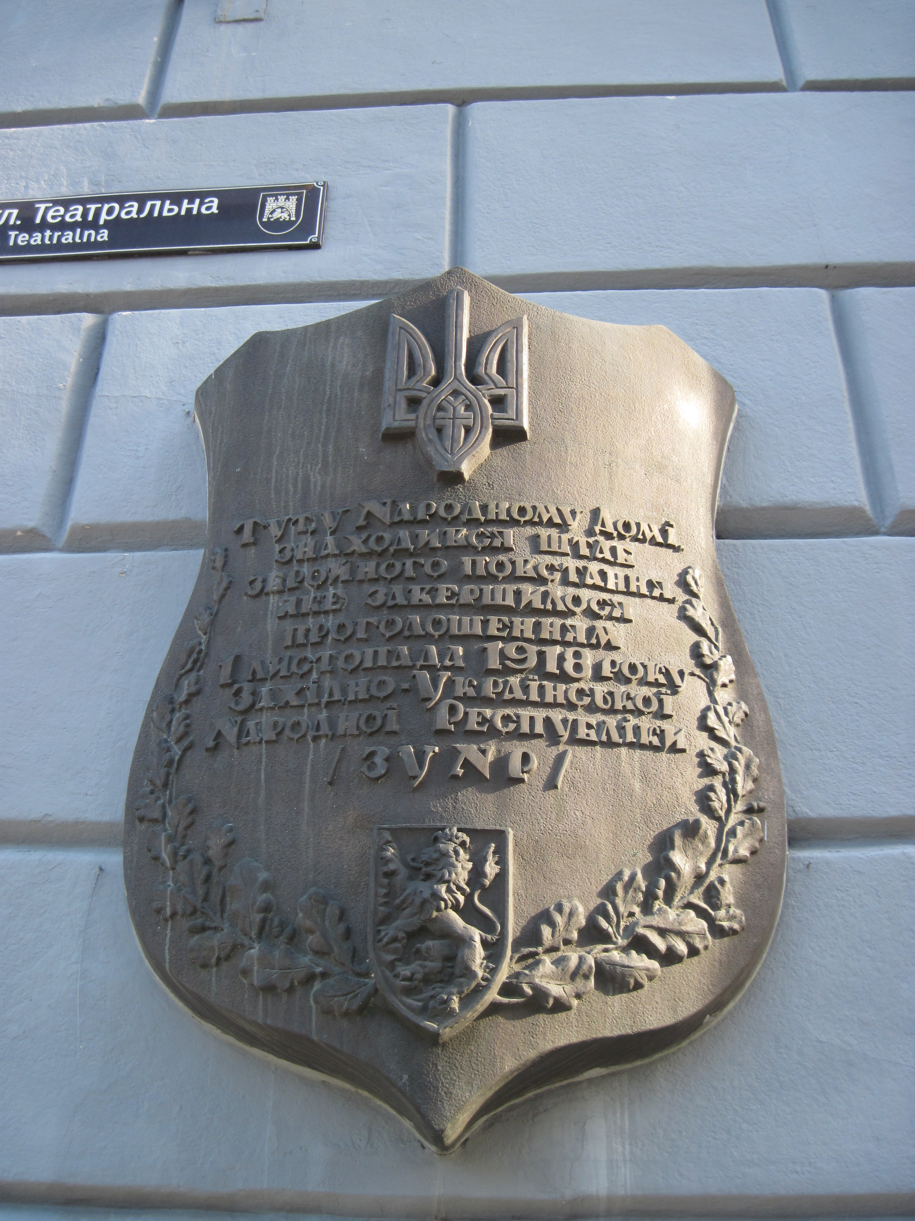 Пам'яна дошка, Західноукраїнська Народна Республіка, осінь 2014